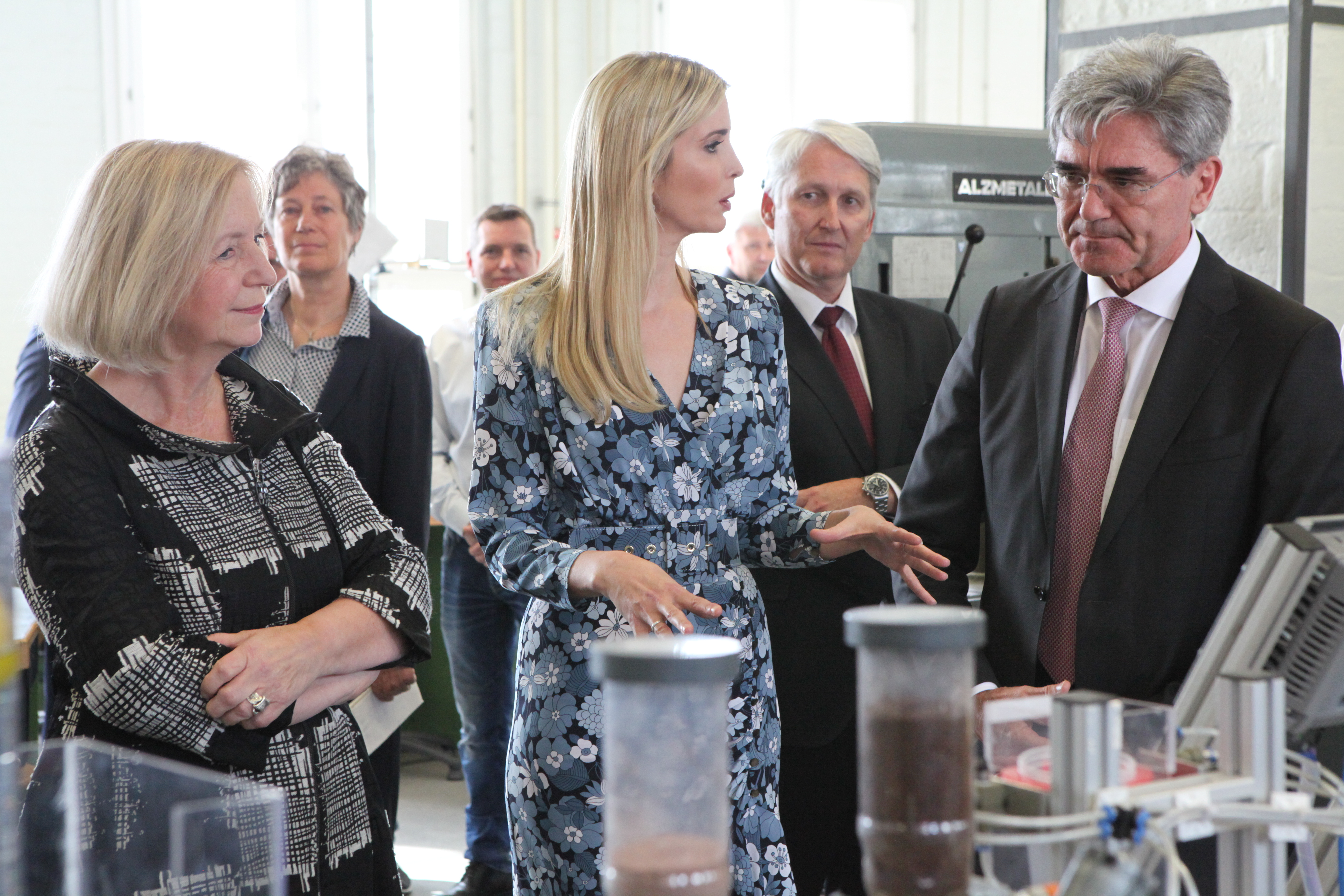 Johanna Wanka, Ivanka Trump and Siemens CEO Joe Kaeser visit Siemens-Technik-Akademie in Berlin